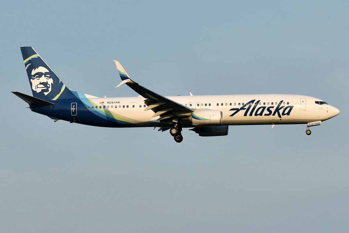 Alaska Airlines, N287AK, Boeing 737-990 ER